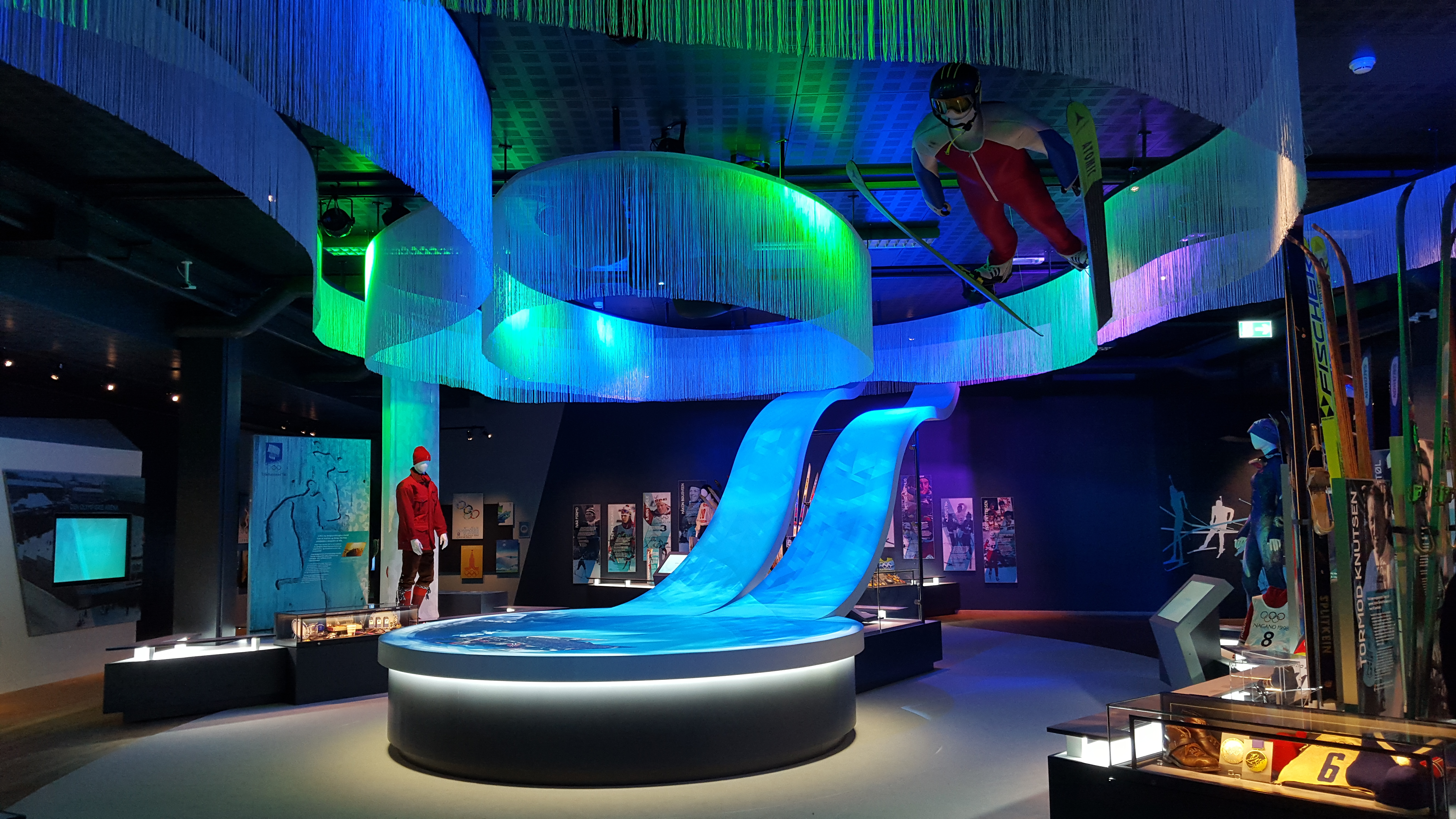 Kopi av Lysgårdsbakkene på Lillehammer er midtpunktet i museet. Foto: Sarah Clarke / Mather & Co.